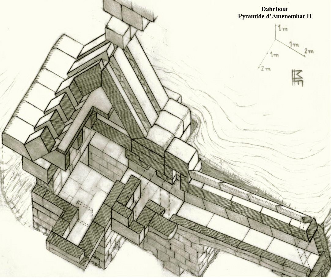 Vue des appartements funéraires de la pyramide d'amenemhat II à Dahchour, niveau 1